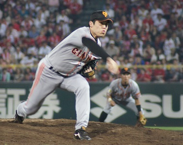 Giants_nishimura35